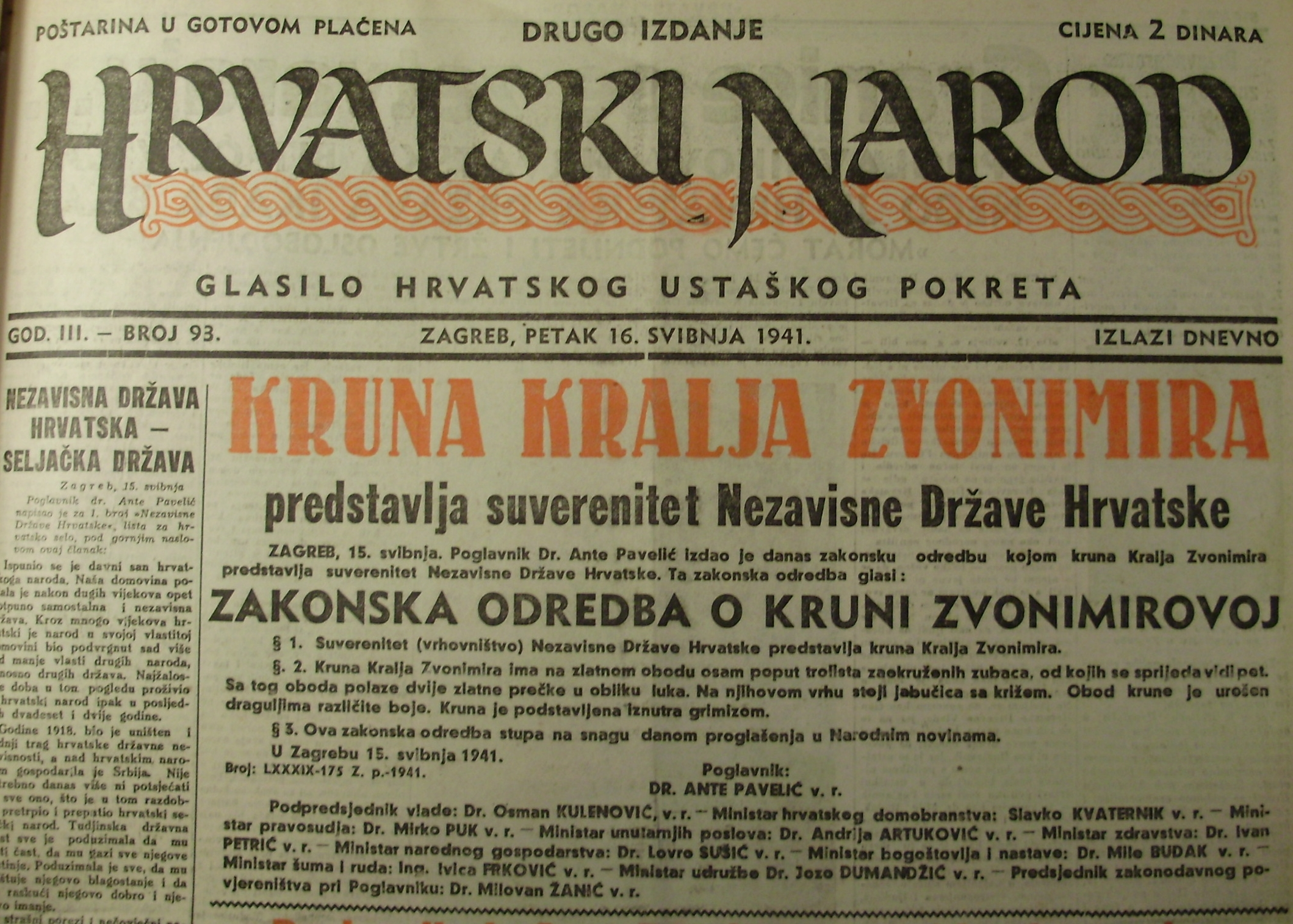 Zakon o kruni zvonimirovoj 15.05.1941. Hrvatski Narod